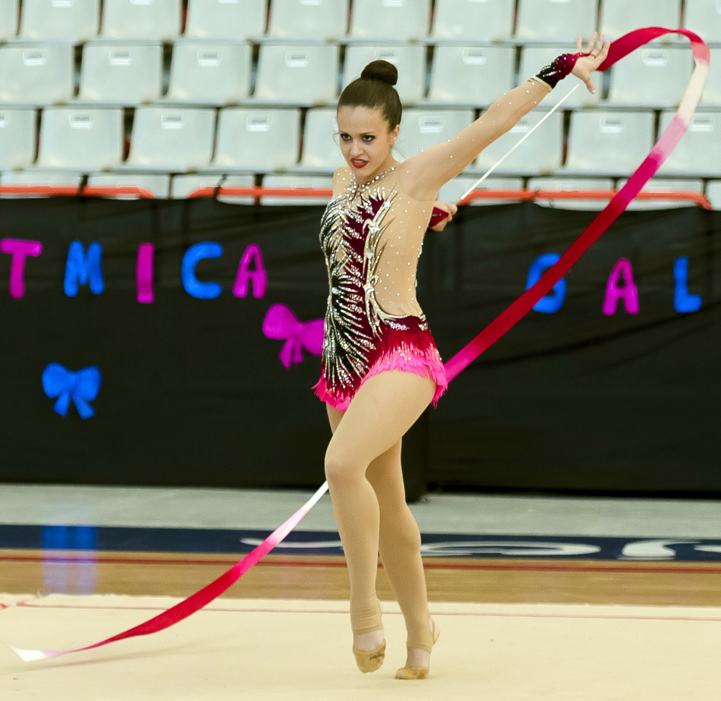 La gimnasta Raquel Rodríguez con la cinta en el XIV Torneo Nacional «Villa de Jovellanos» para nivel federado el 30 de mayo de 2015 en el Palacio de Deportes de Gijón.